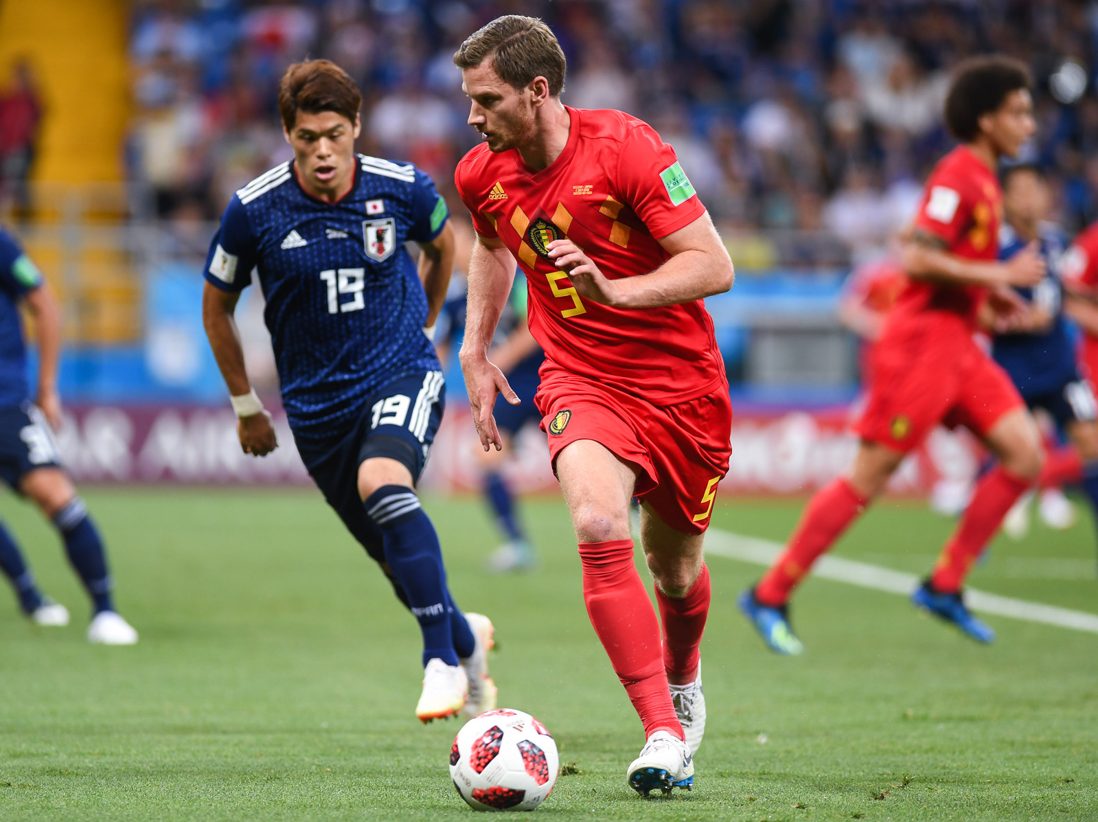 Потрясающий камбэк сборной Бельгии в матче с Японией